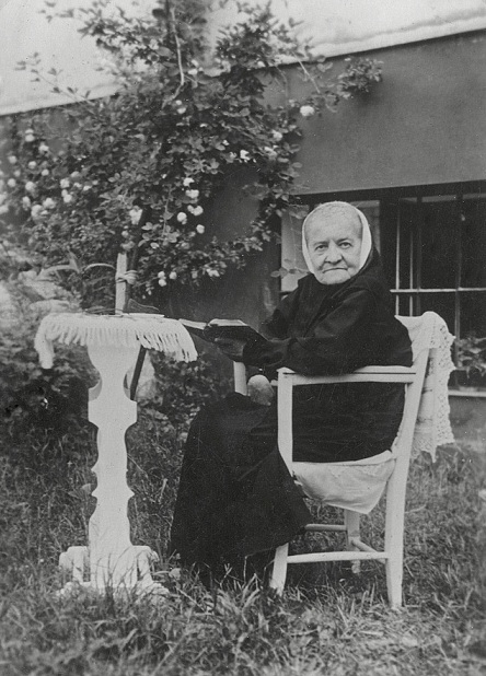 Kristína Royová (1860-1936)¨, slovenská spisovatelka a evangelická diakonka